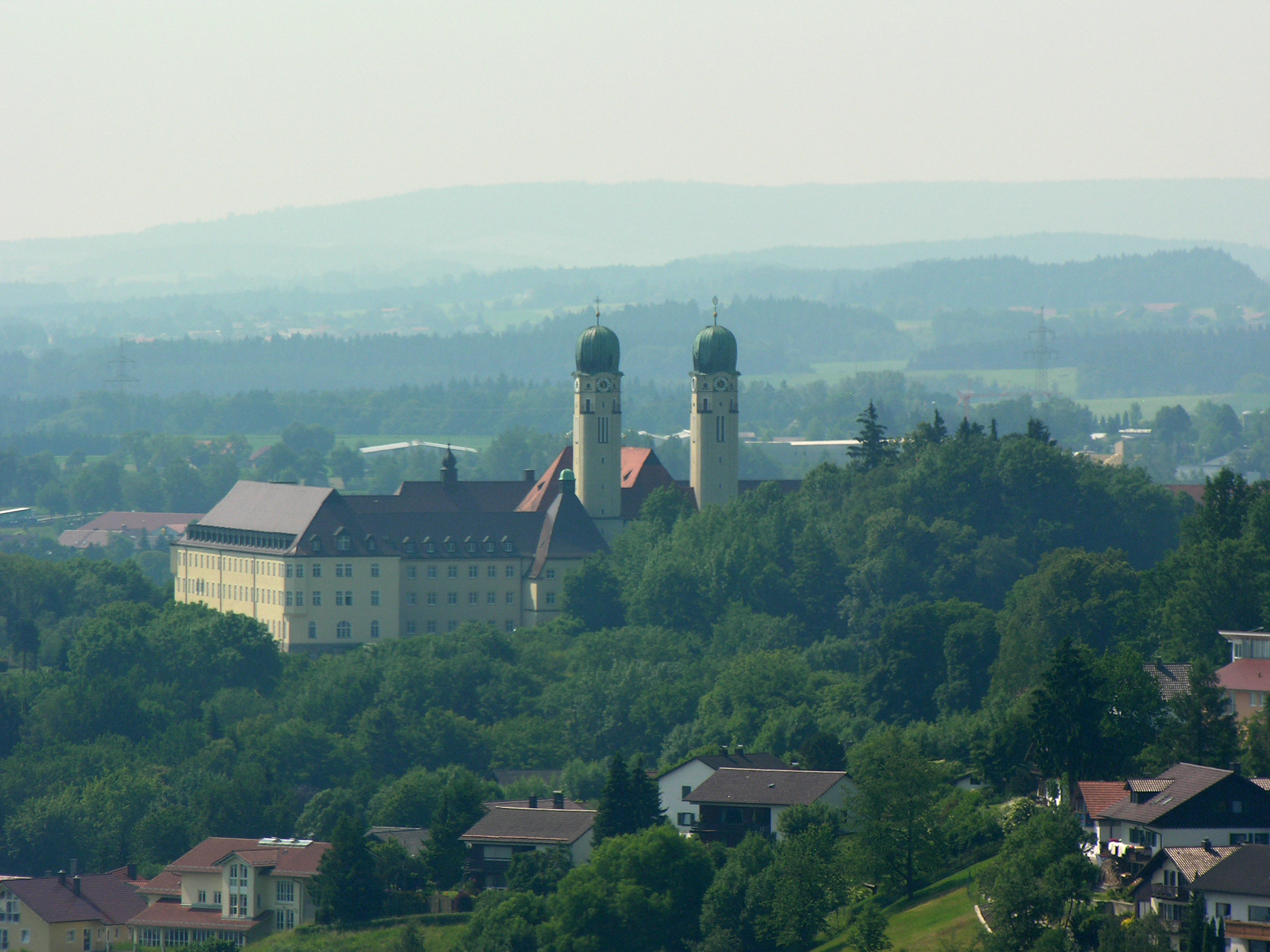 Germany, Bavaria, Vilshofen an der Donau